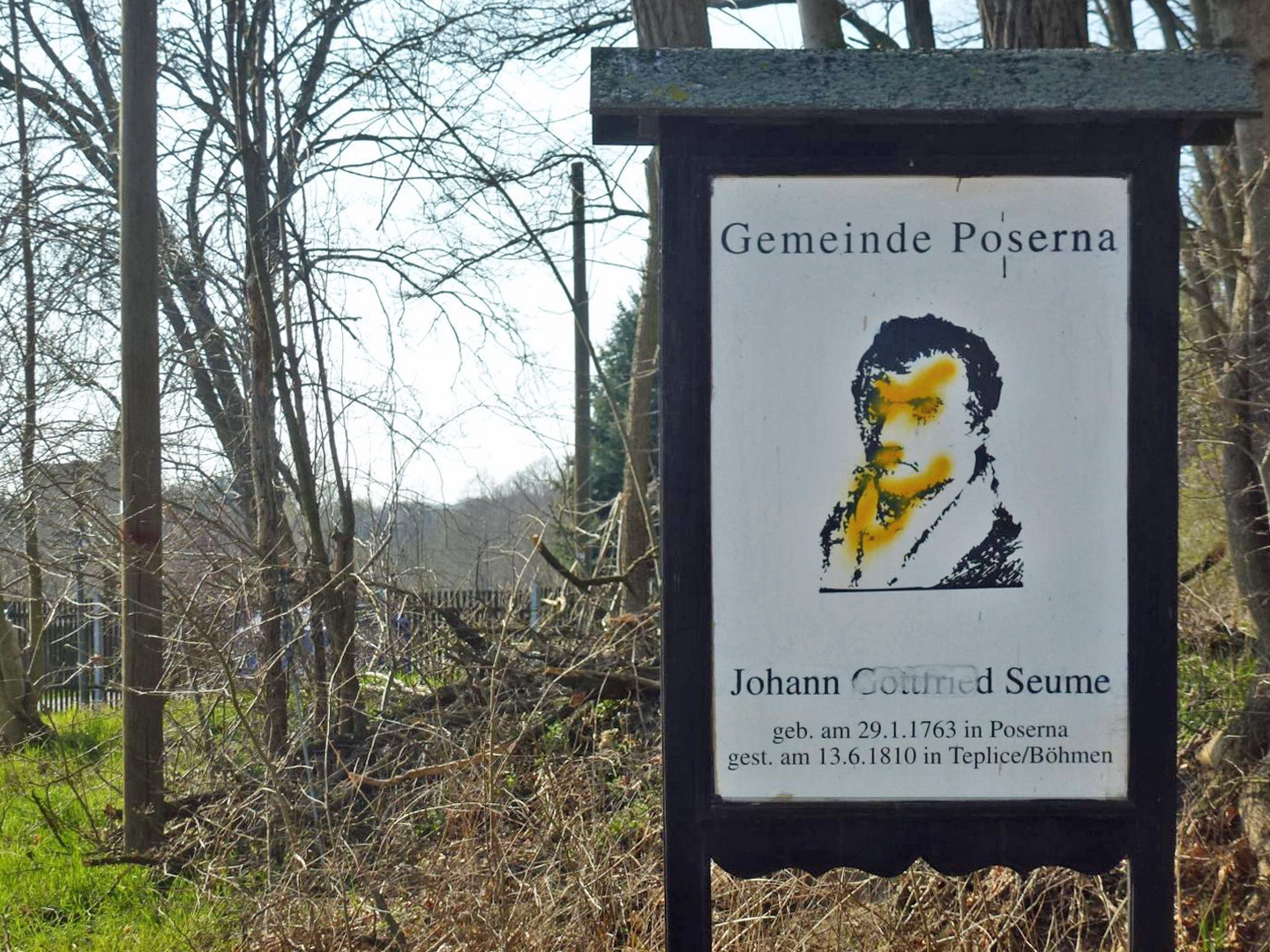 Seumeschild am Ortseingang von Poserna